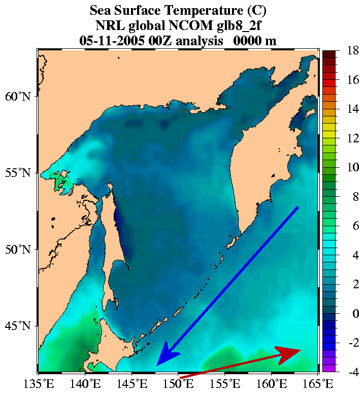 Wassertemperatur des Oyashio am 11. Mai 2005. Da die Strömung im Frühling sehr stark ausfällt, ist ein weites Vordringen der kalten Wassermassen nach Süden zu erkennen. Der blaue Pfeil zeigt die Strömungsrichtung des Oyashio an, der dunkelrote Pfeil zeigt den warmen Kuroshio.